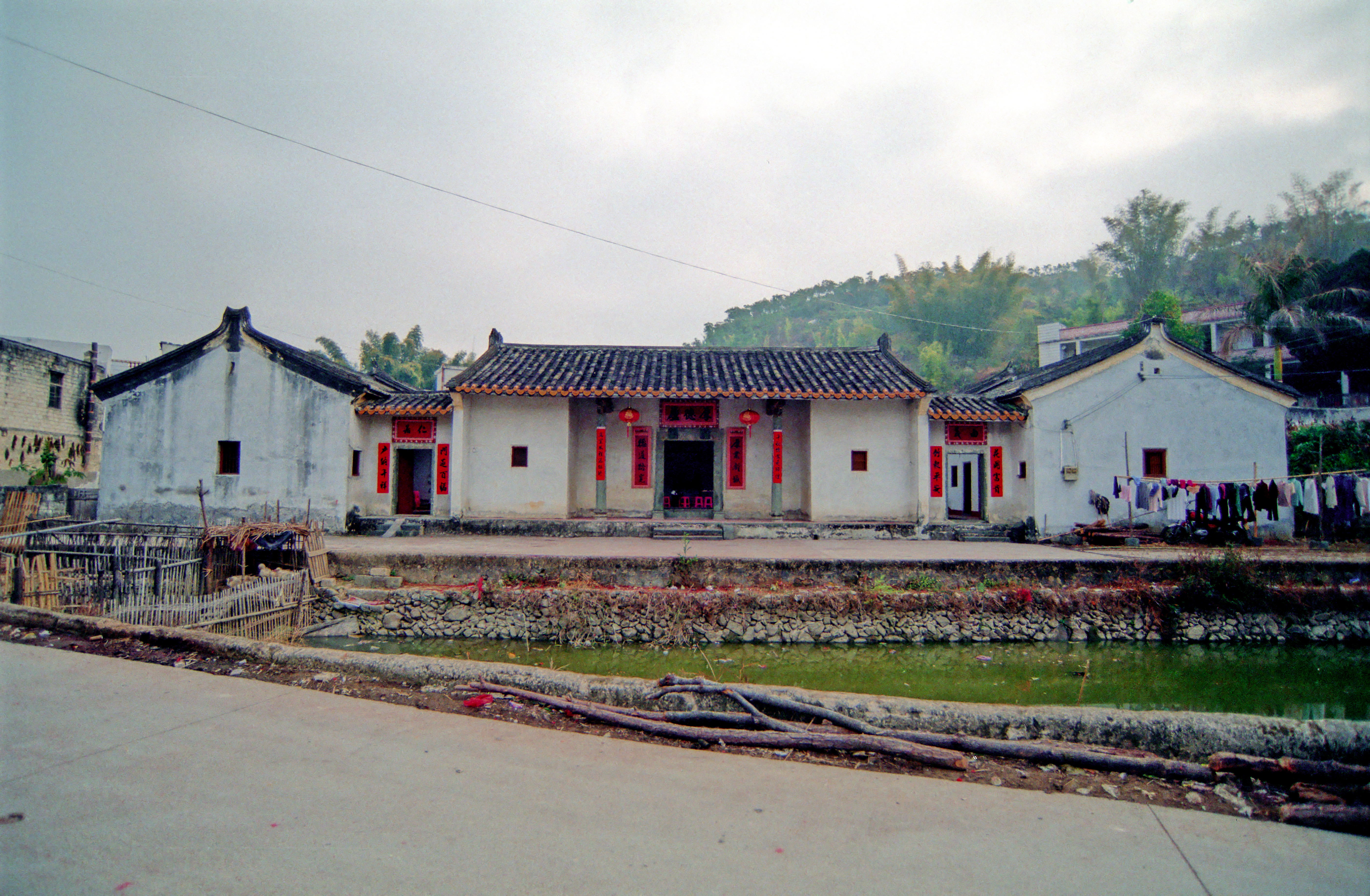 小椹厚德庐